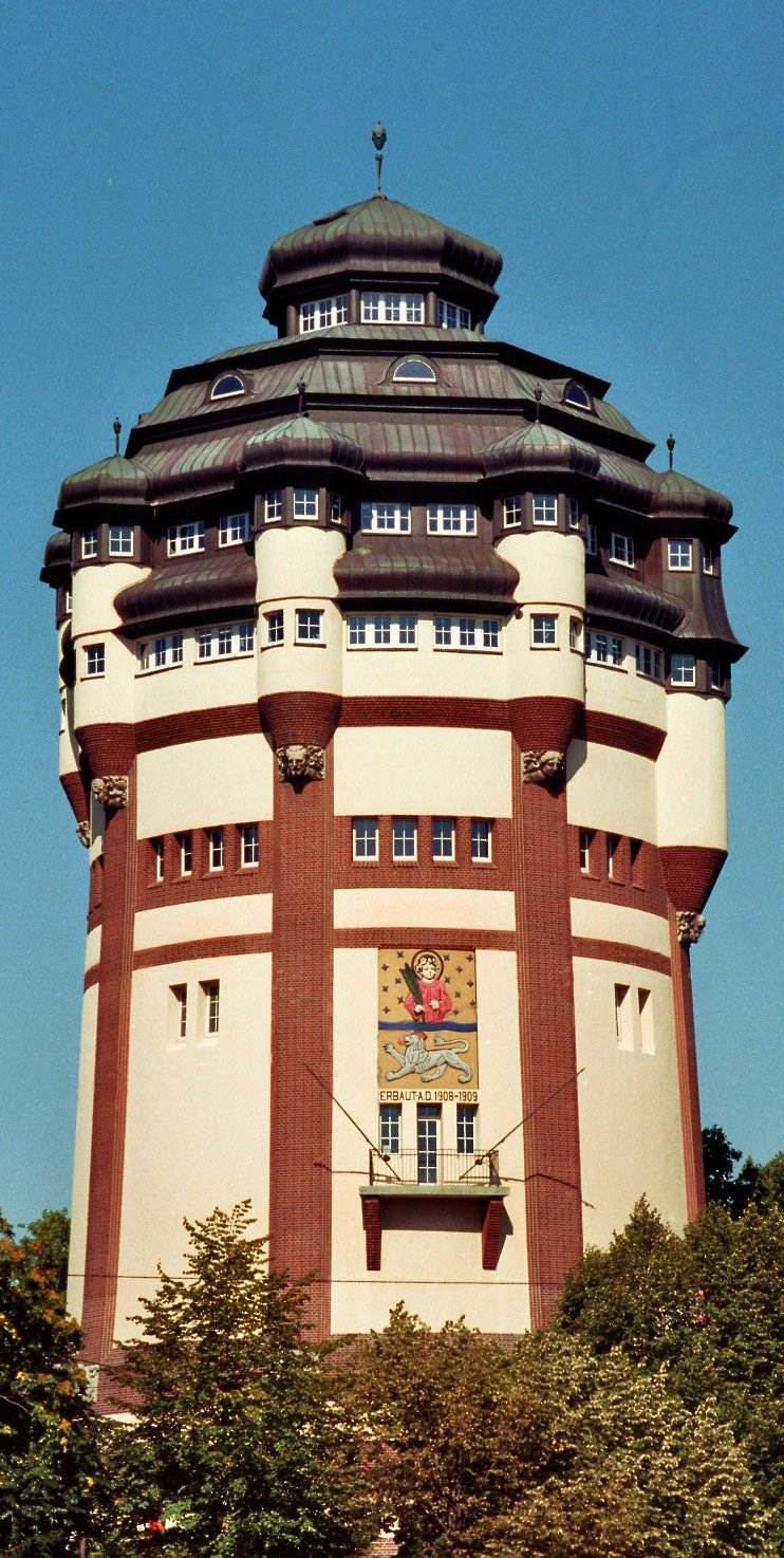 Wasserturm Viersener Straße Mönchengladbach This image shows a heritage building in Germany, located in the North Rhine-Westphalian city Mönchengladbach (no. V 008).